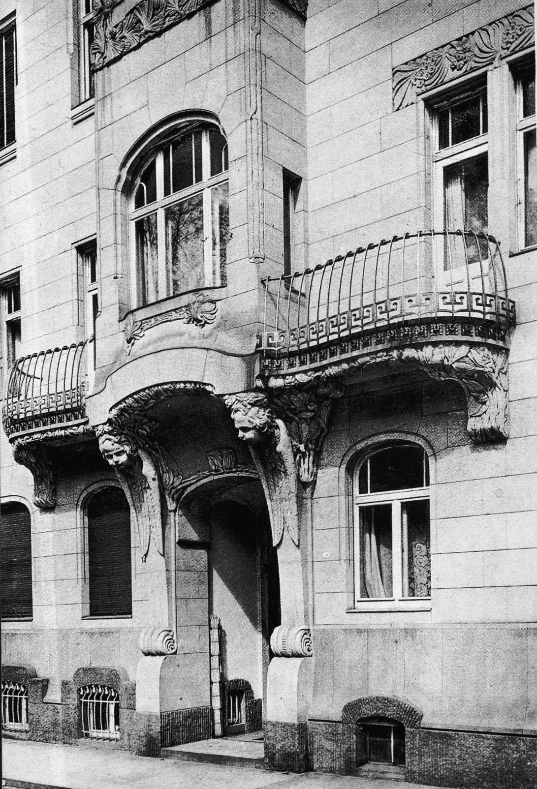 Mehrfamilienwohnhaus Lindengasse 14 in Dresden, Seevorstadt, erbaut 1900-1901 von Felux Reinhold Voretzsch, 1945 zerstört